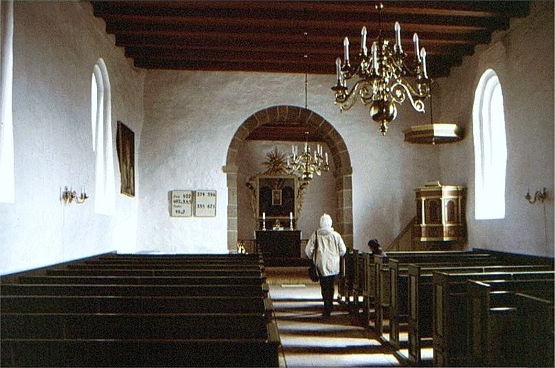 Bjergby Kirke i Danmark. Skib mod øst